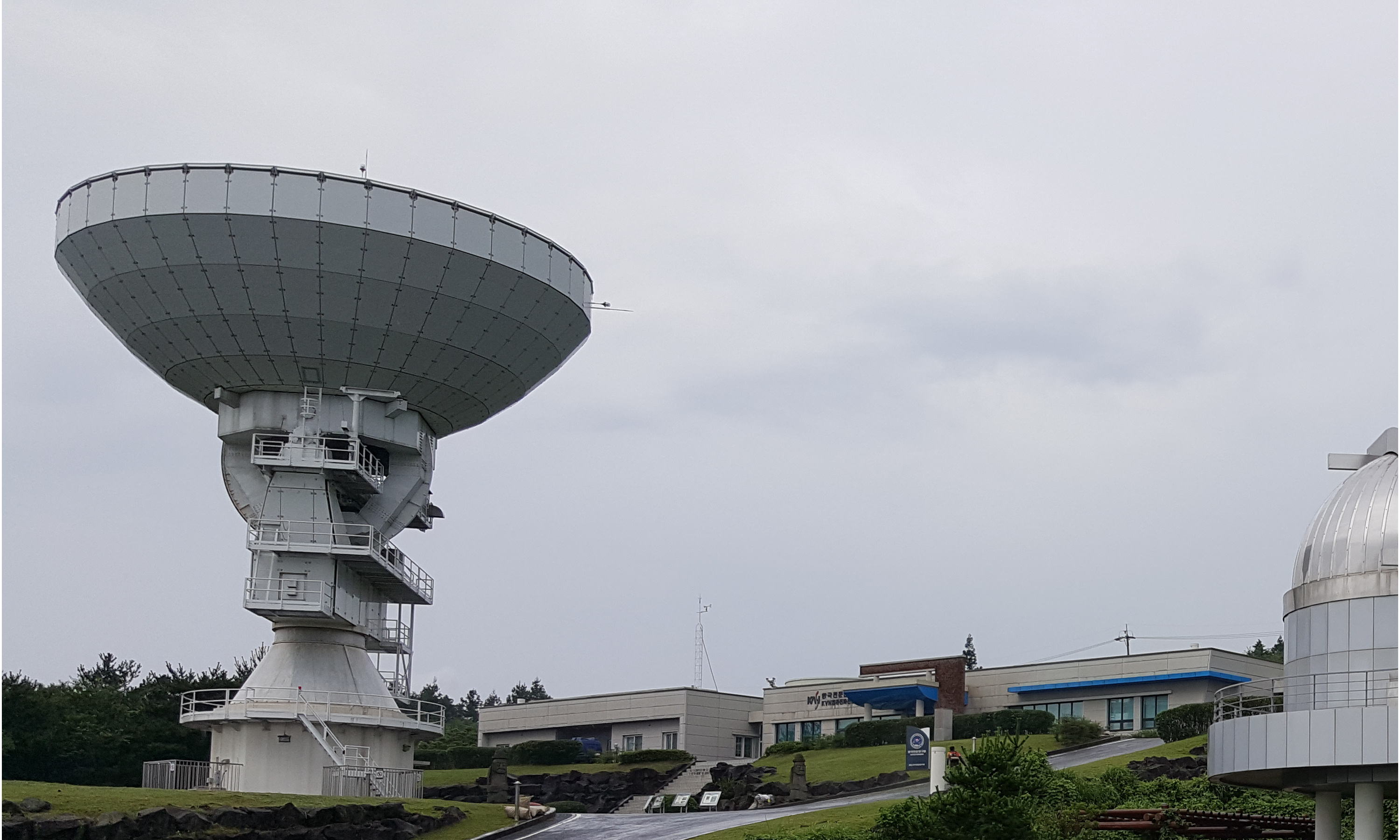 South Korea, Jeju island, Tanma Radio Observatory, part of KVN cutting 20170801 original 20170718